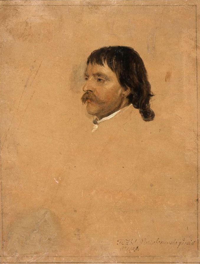 Беларуская (тарашкевіца): Партрэт Францішка Князьніна